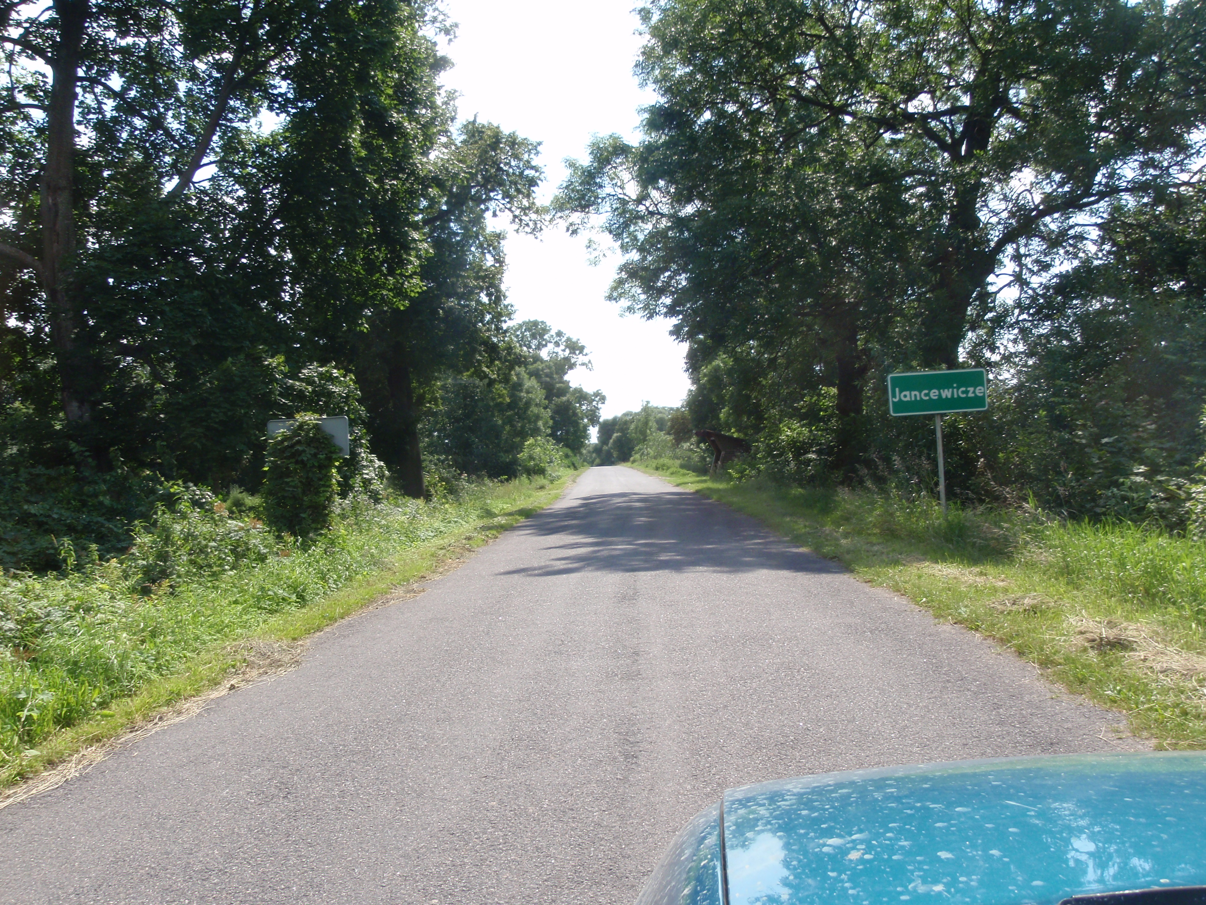 Jancewicze - wjazd od północy